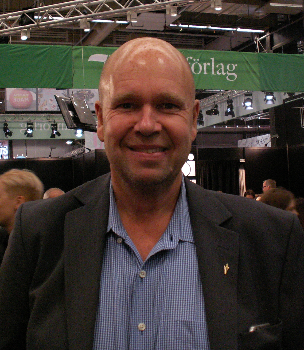 Lasse Kronér på Bokmässan i Göteborg 2016.